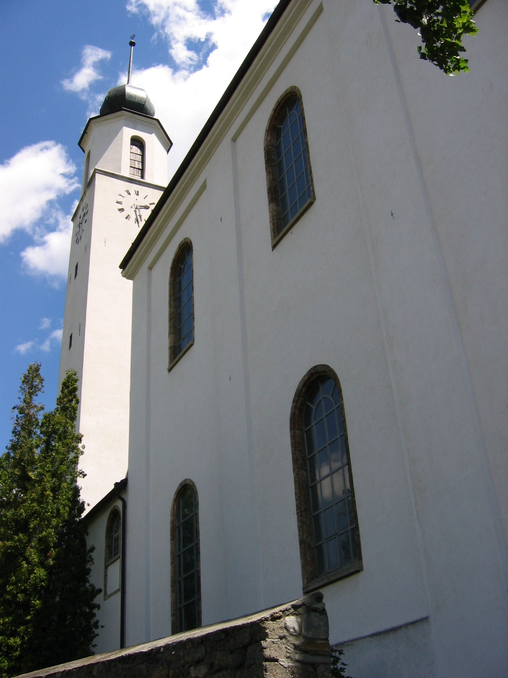 Pfarr- und Kollegiumskirche (Jesuitenkirche) zu Brig (VS).